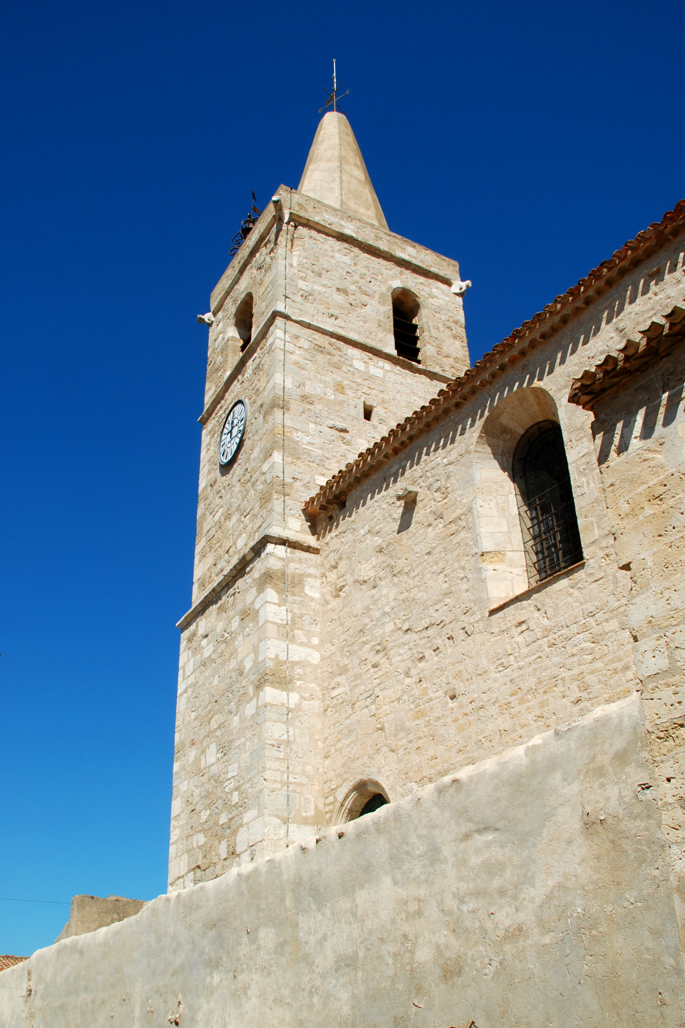 France - Languedoc - Aude - Église Saint-Jean l’Évangéliste d'Ouveillan